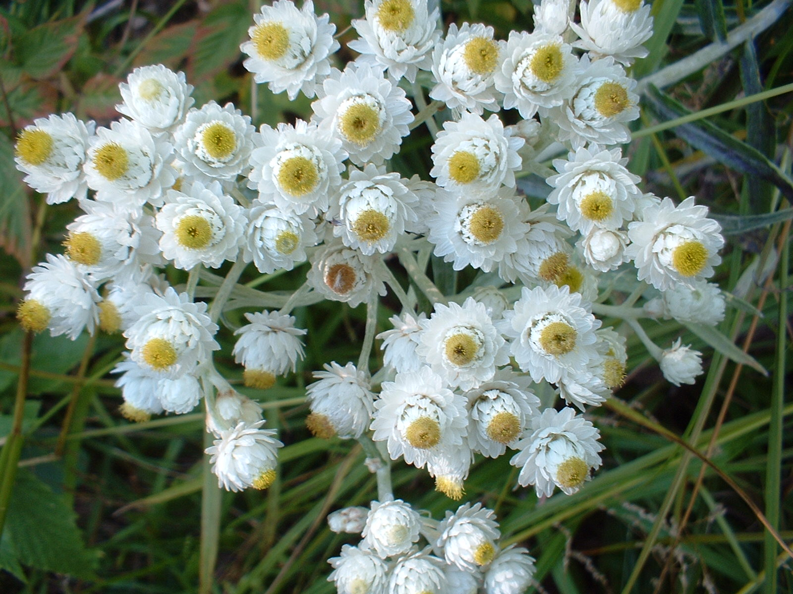 Val-David, Quebec, 2004